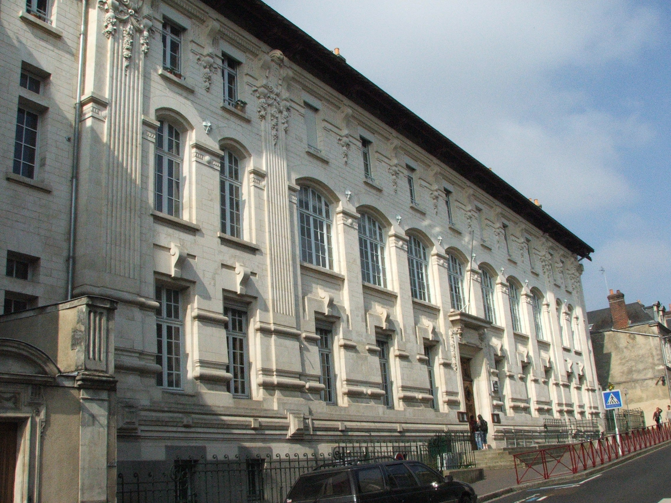 L'ancien Lycée de Jeunes Filles du Mans créé au début des années 1900, aujourd'hui devenu collège Berthelot.